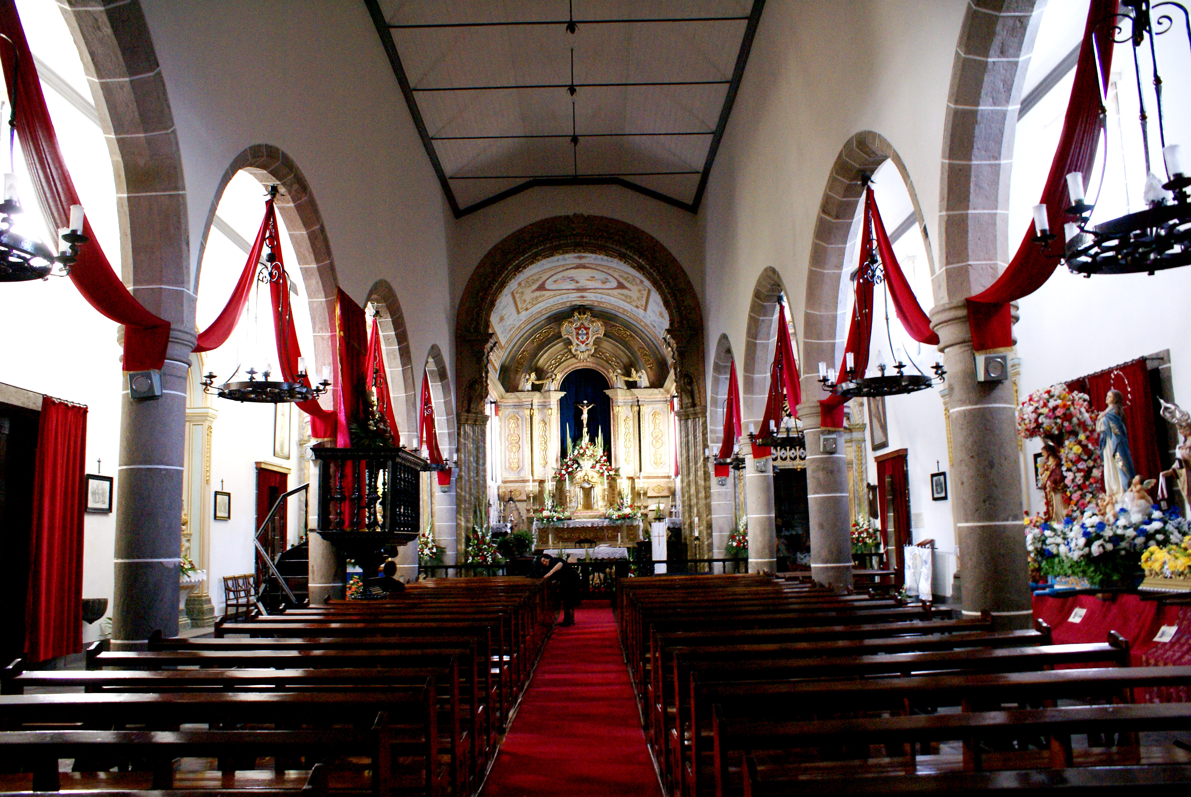 Nave - Igreja Paroquial de Água de Pau / Igreja de Nossa Senhora dos Anjos. Portugal, Açores, Ilha de São Miguel, (Ponta Delgada), Lagoa, Água de Pau.